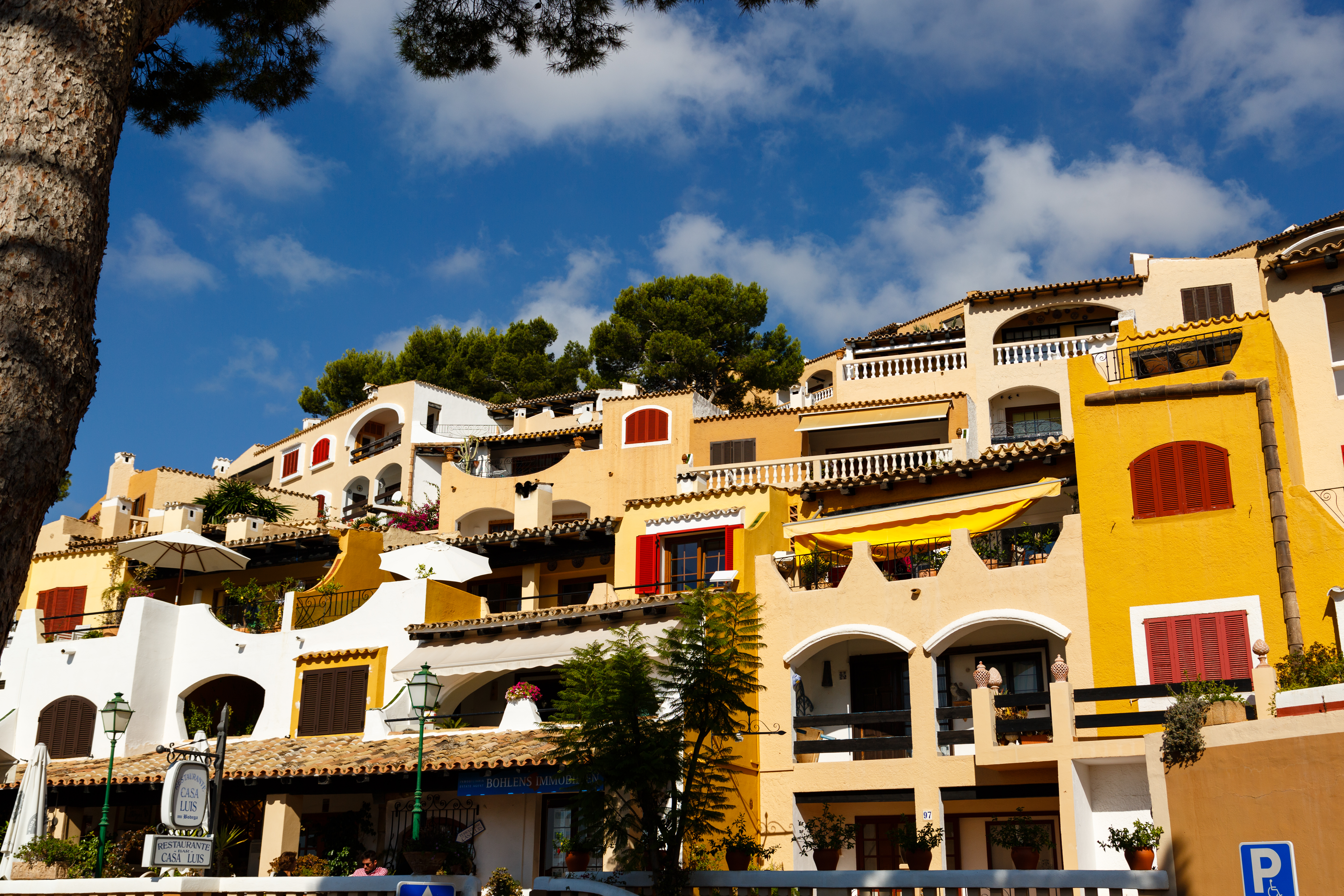 Ferienanlage in Cala Fornells